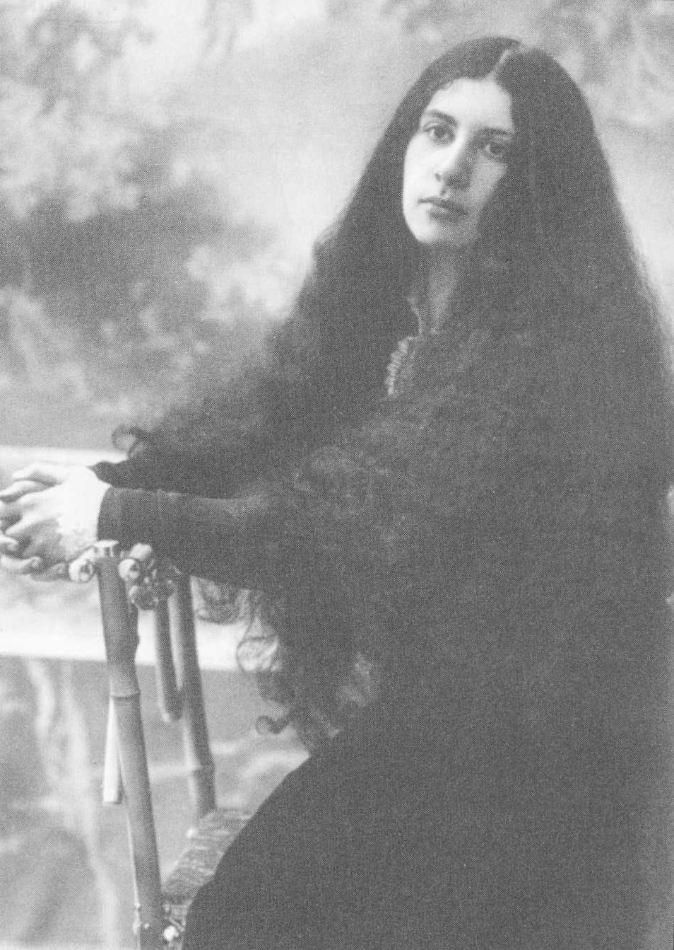 Шор